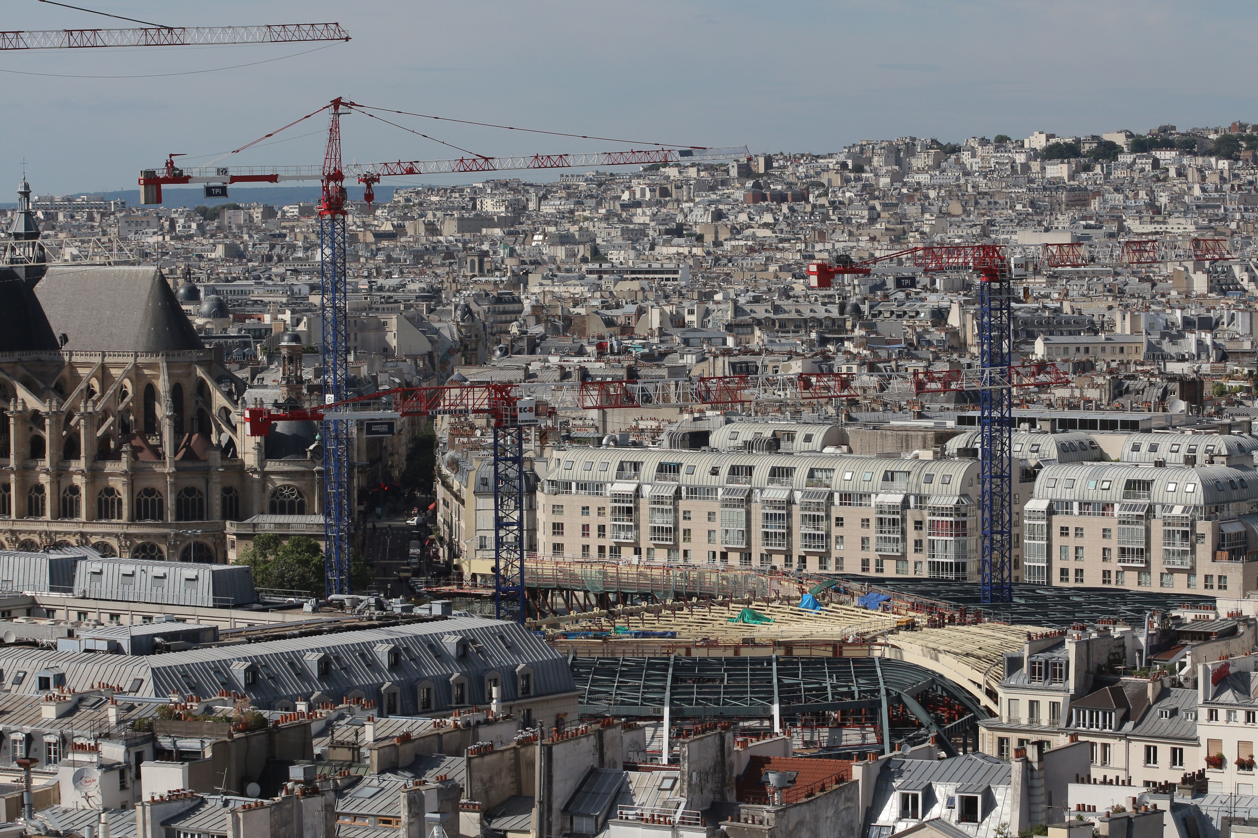 Chantier du Forum des Halles, la Canopée et le chevet de l'église Saint-Eustache vus depuis la tour Saint-Jacques